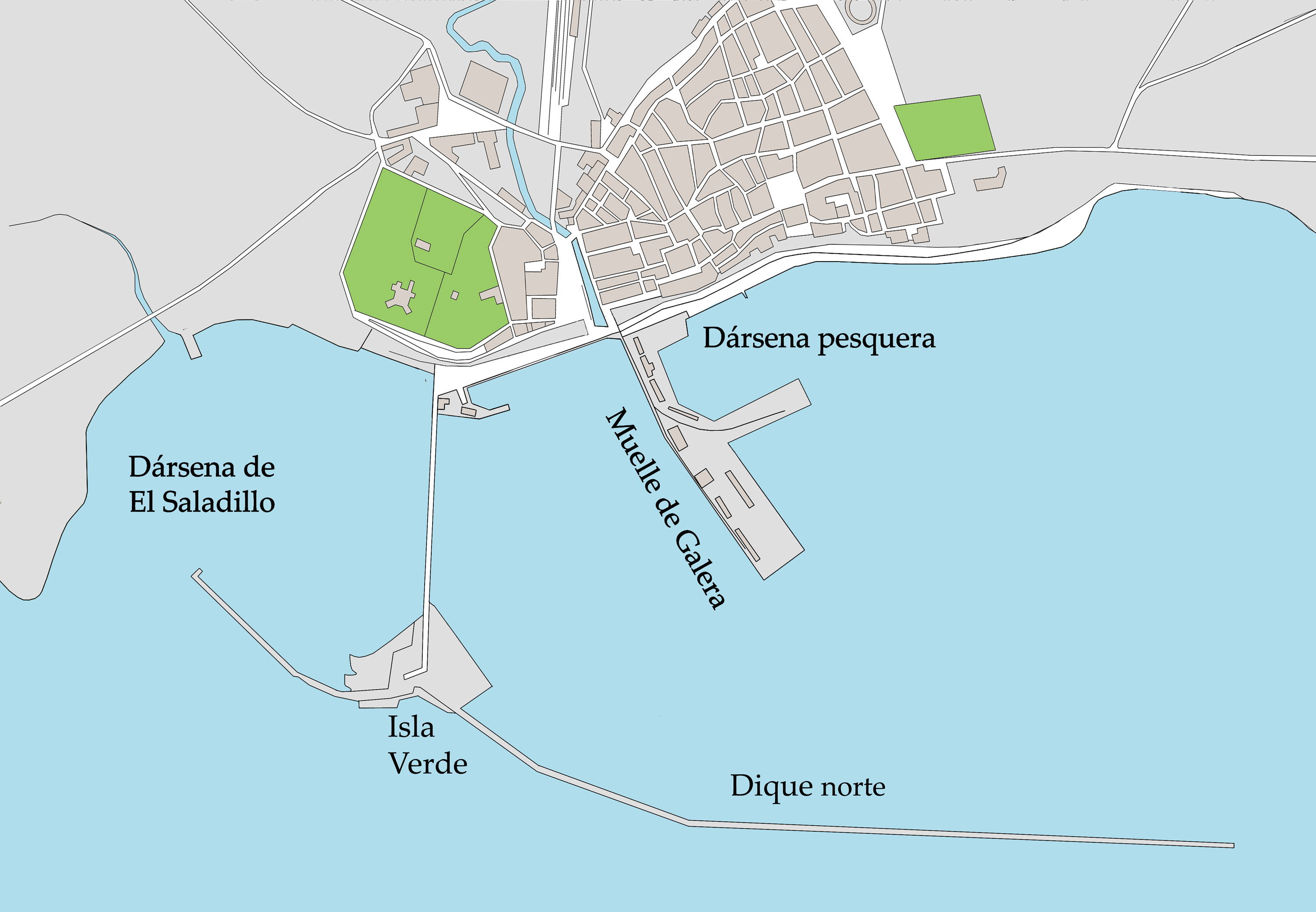 Plano del puerto de Algeciras (España) en el año 1936.